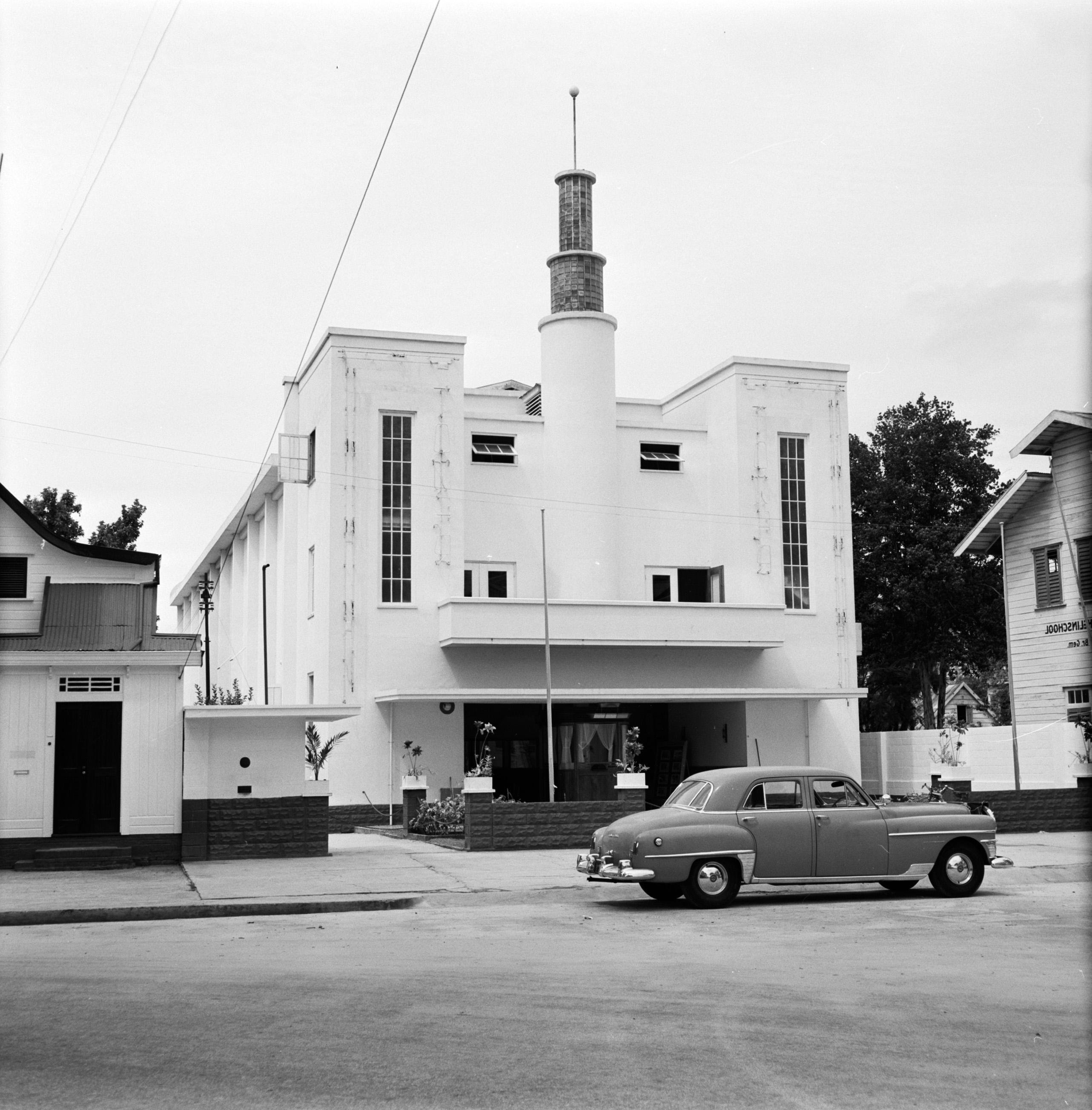 Collectie / Archief : Fotocollectie Van de Poll Reportage / Serie : Nederlandse Antillen en Suriname ten tijde van het koninklijk bezoek van koningin Juliana en prins Bernhard in 1955 Beschrijving : Bioscoop Tower, Heerenstraat 50 in Paramaribo Datum : 1 oktober 1955 Locatie : Paramaribo, Suriname Trefwoorden : bioscopen, gebouwen Fotograaf : Poll, Willem van de Auteursrechthebbende : Nationaal Archief Materiaalsoort : Negatief (zwart/wit) Nummer archiefinventaris : bekijk toegang 2.24.14.02 Bestanddeelnummer : 252-5004